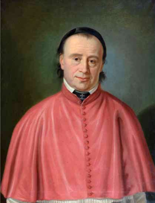 Porträt eines Kanonikers von St-Maurice